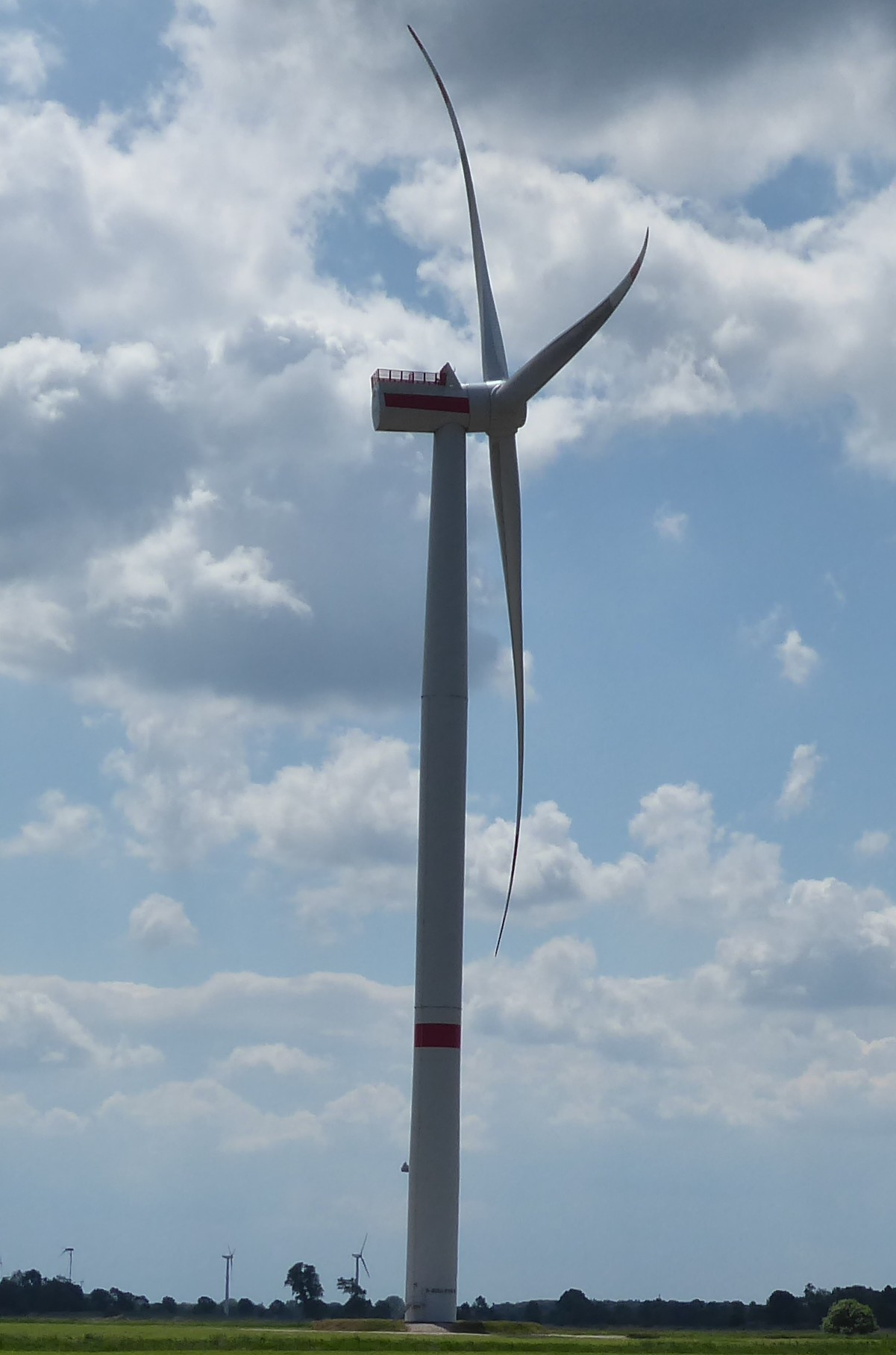 Siemens SWT-6.0-154 im Windpark Anzetel Wehlens, Sengwarden